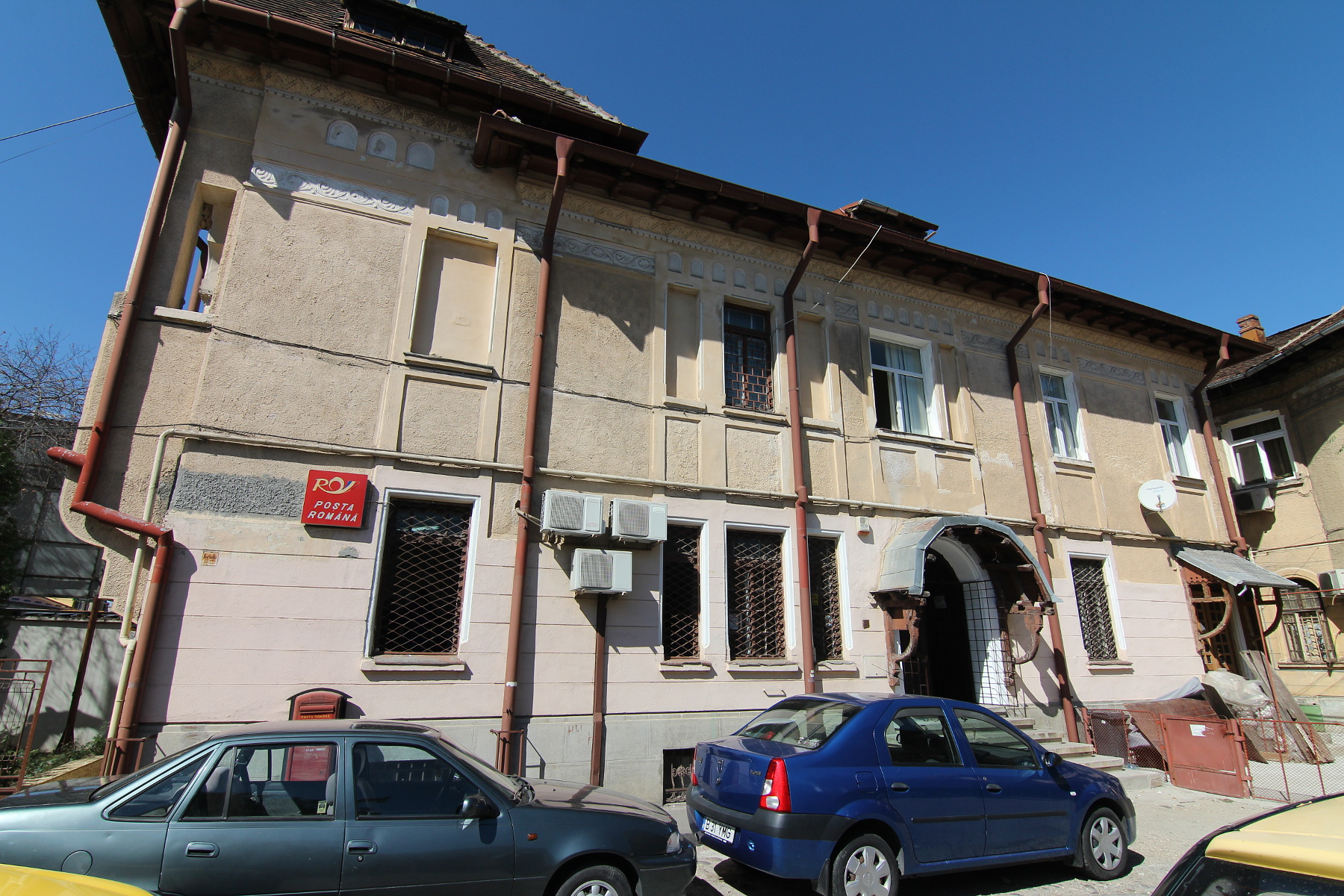 Imobil pe Calea Călărașilor